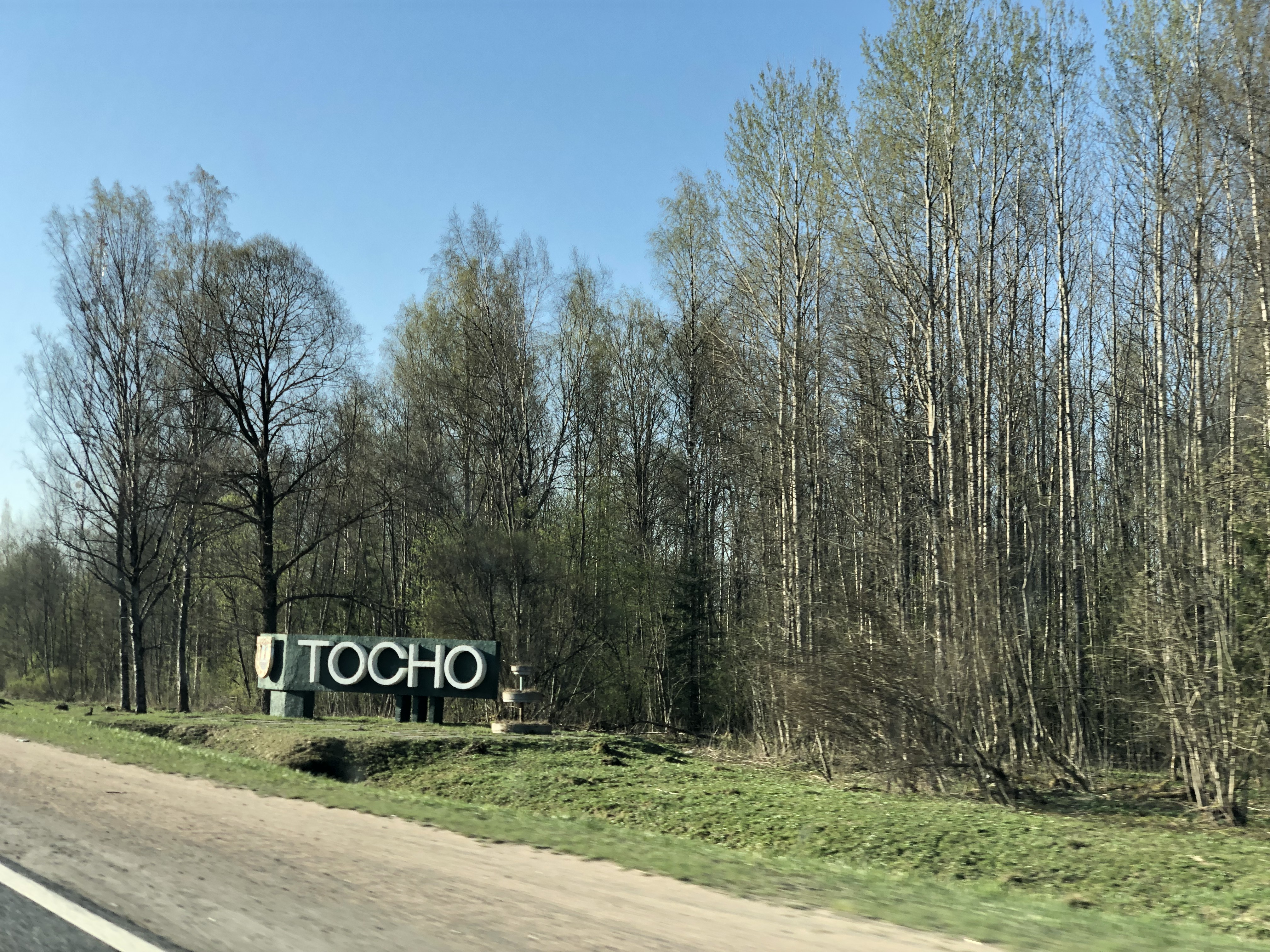 въезд в Тосно со стороны Петербурга